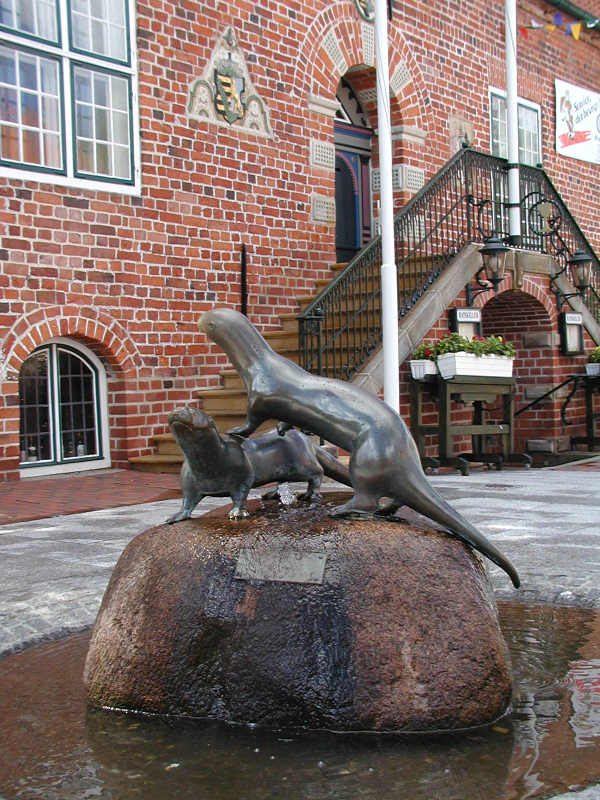 Der Otterbrunnen